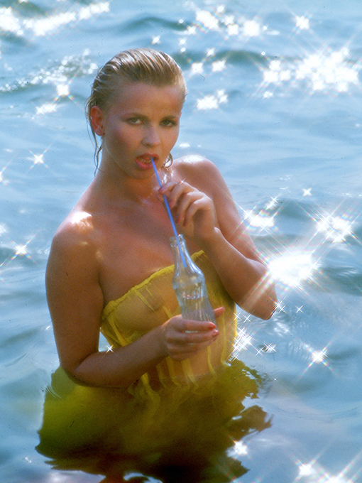 Barna Ilona modell, fotográfus (Biphoto)